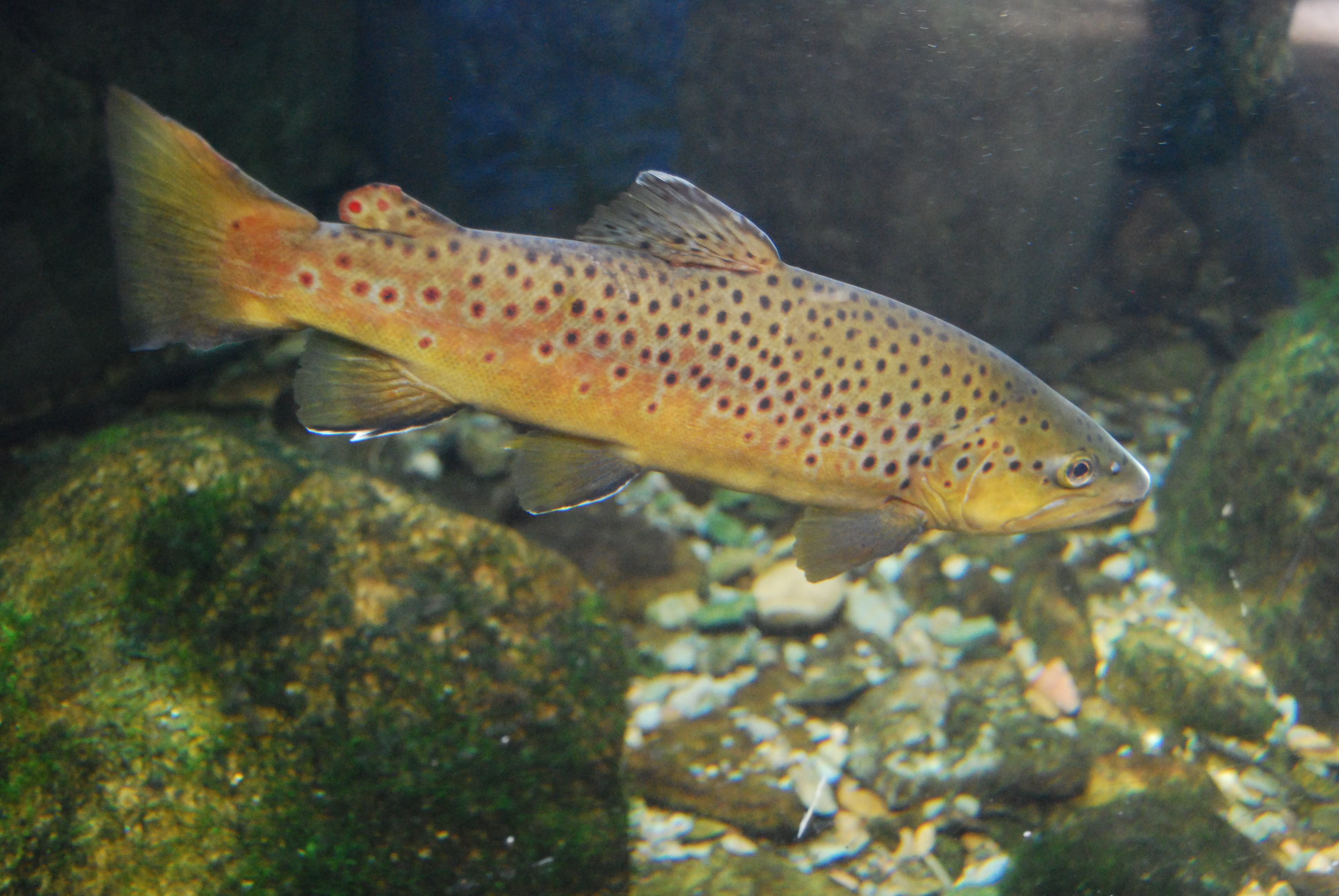 Truite fario dans la Sorgue de Velleron (Vaucluse).